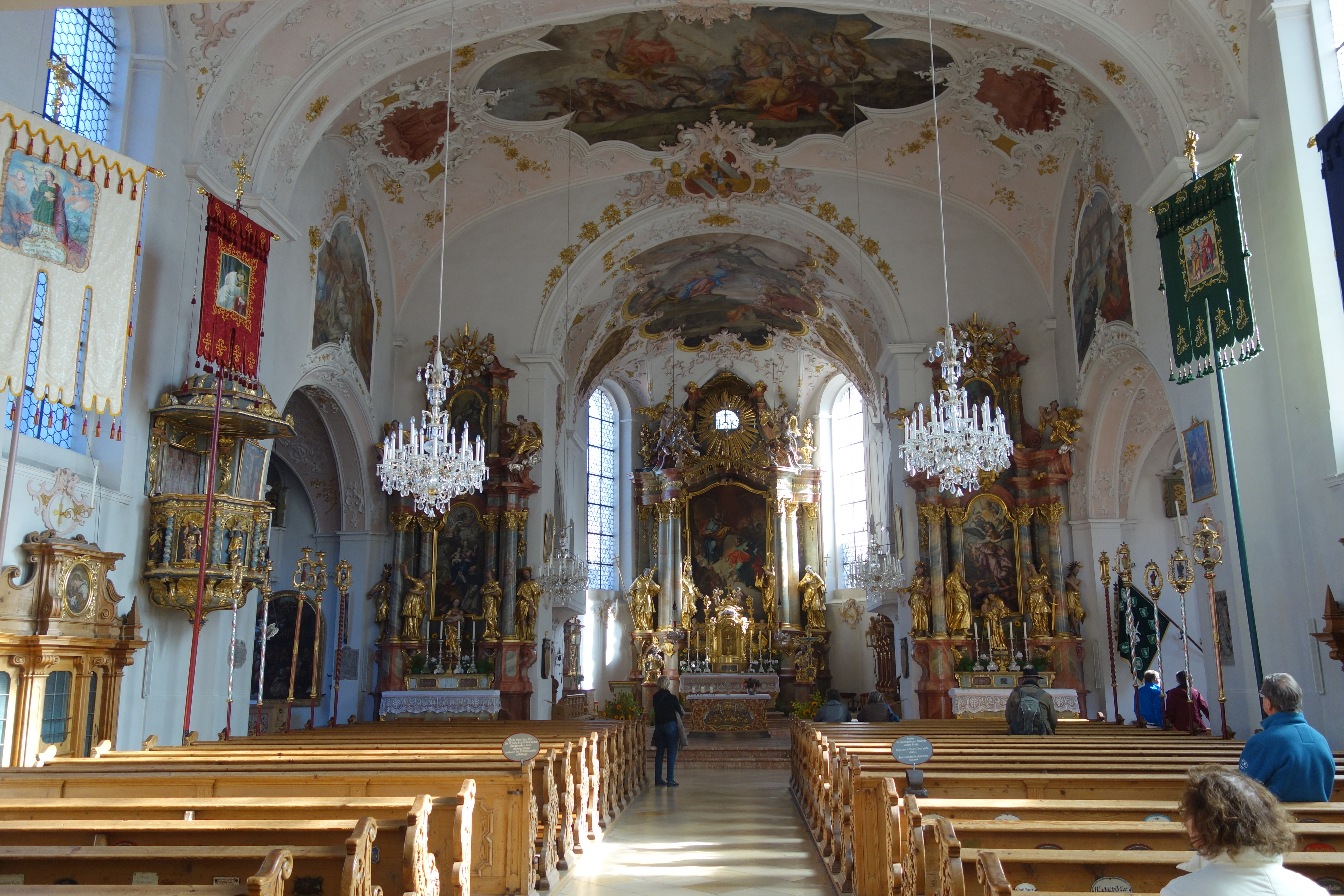 Inneraum der Kirche